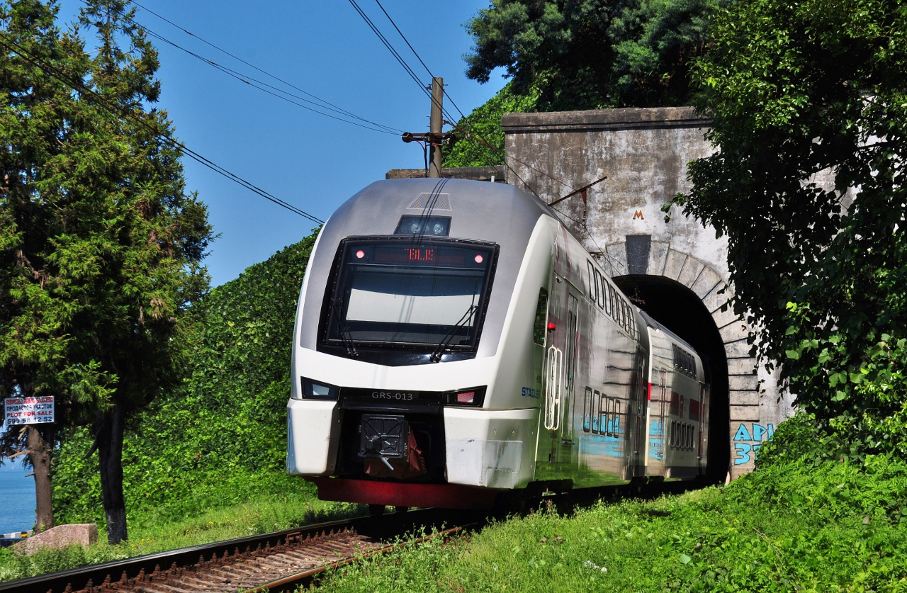 Электропоезд GRS-013 (ESh2-013) въезжает в тоннель возле станции Махинджаури, Грузия